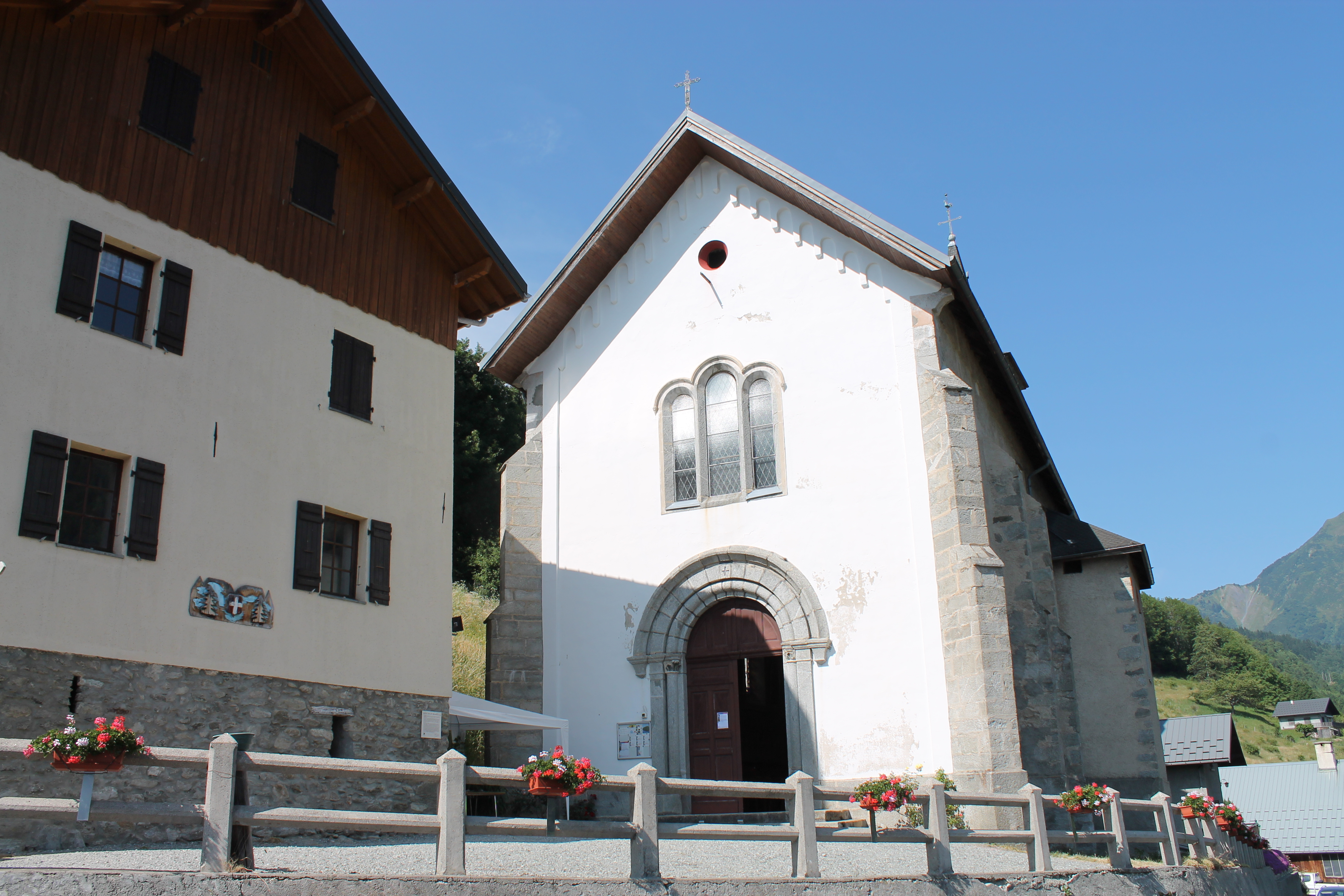 Gîte rural (à gauche) et façade de l'église Saint-Barthélémy (XIXe siècle) de Montsapey.